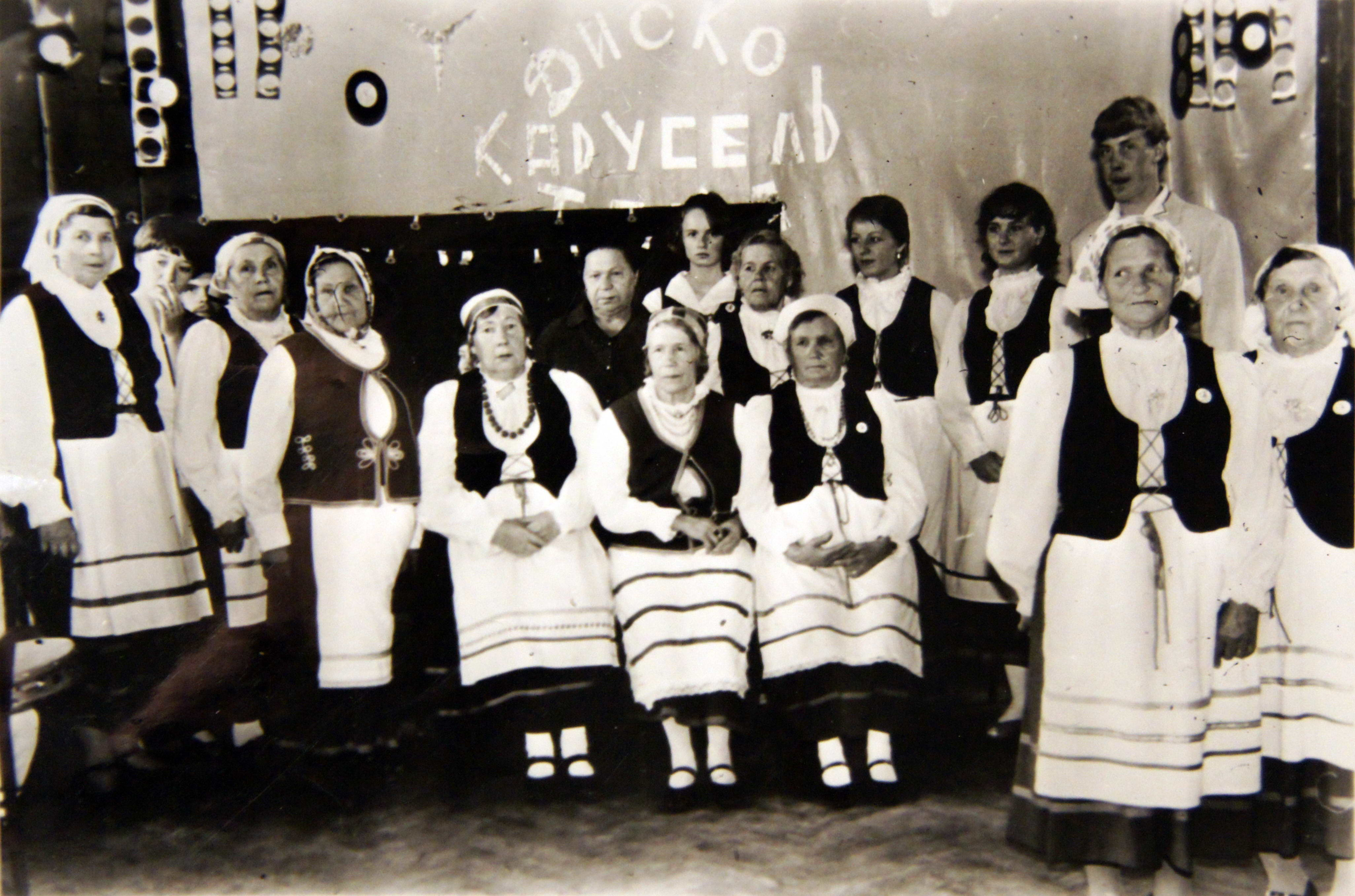 Фольклорно-этнографический коллектив «Рёнтюшки» выступает в Рапполово.